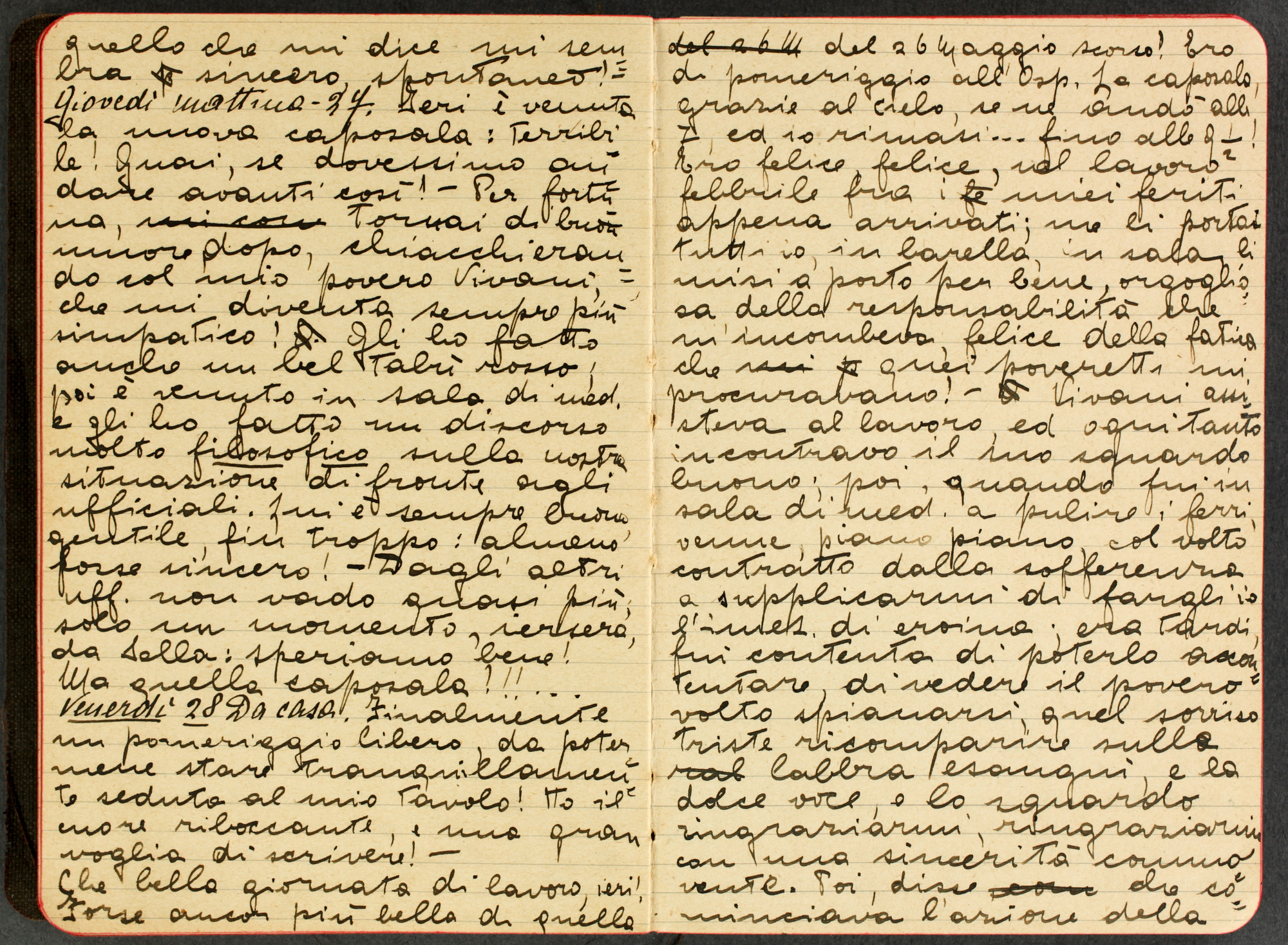 Fanny Castiglioni sul ferito Ettore Vivani